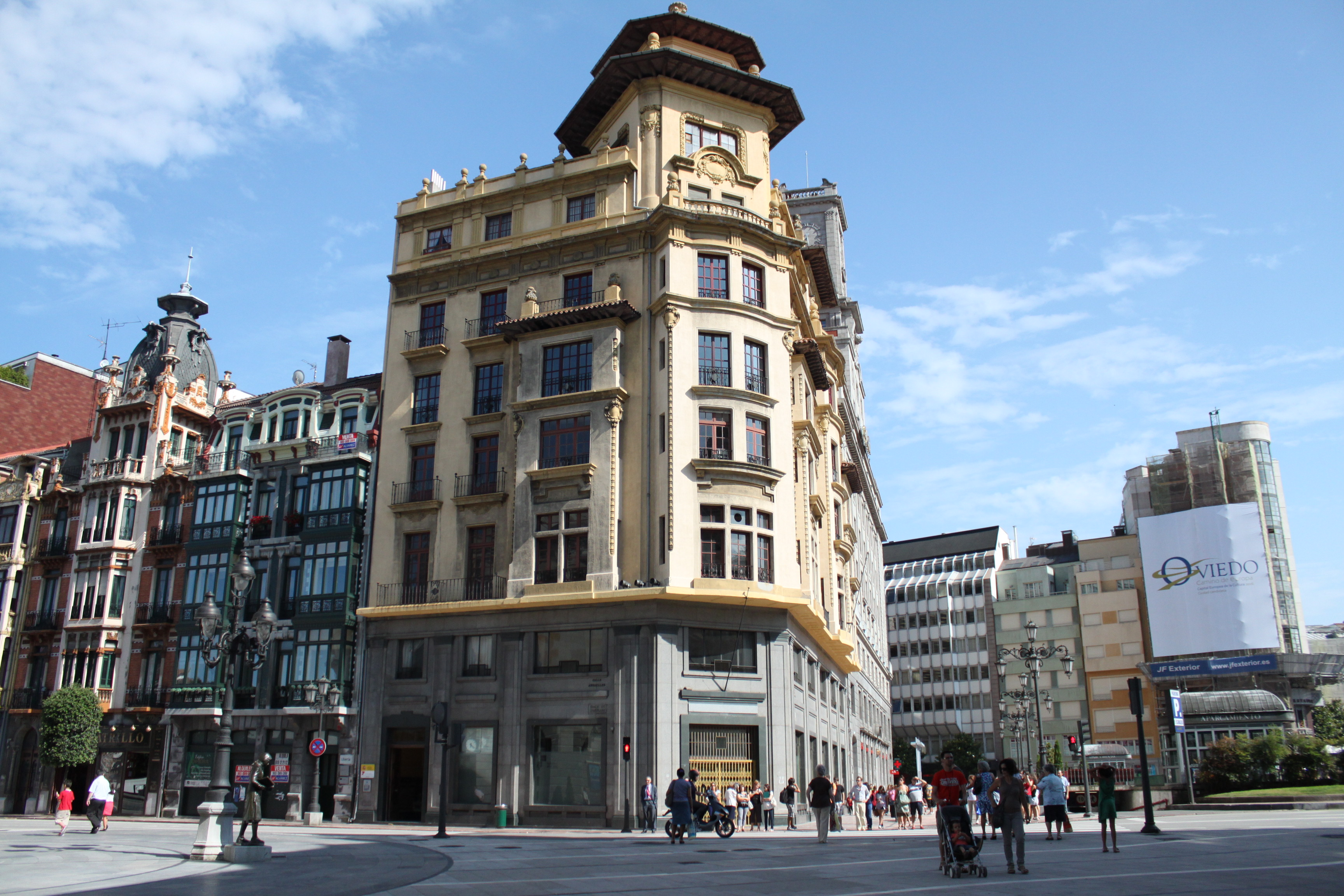 Ejemplo de arquitectura regionalista en Oviedo, España